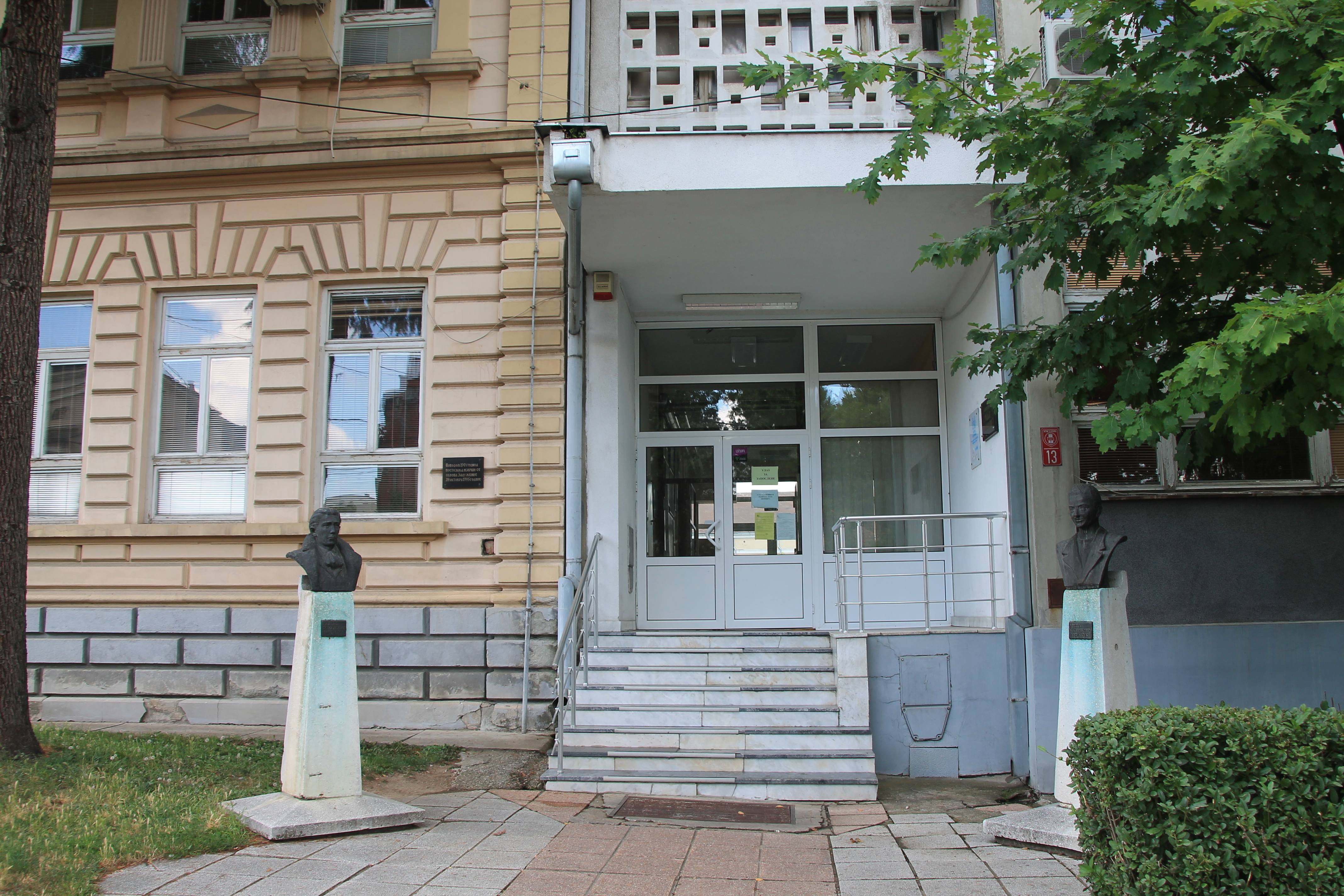 Zadužbina Milovana Gušića